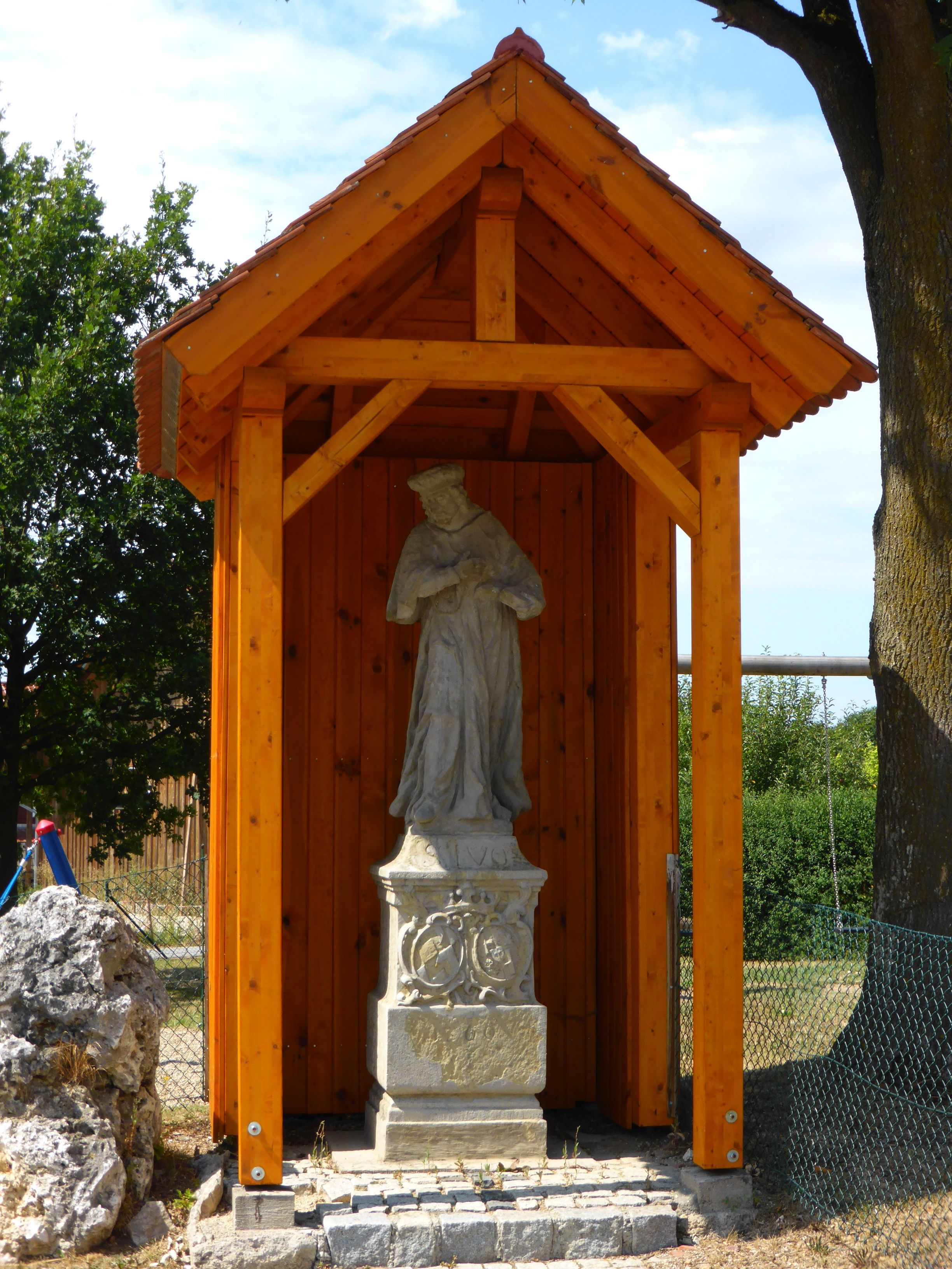 Hl. Ivo (Viehhausen) Gemeinde Sinzing